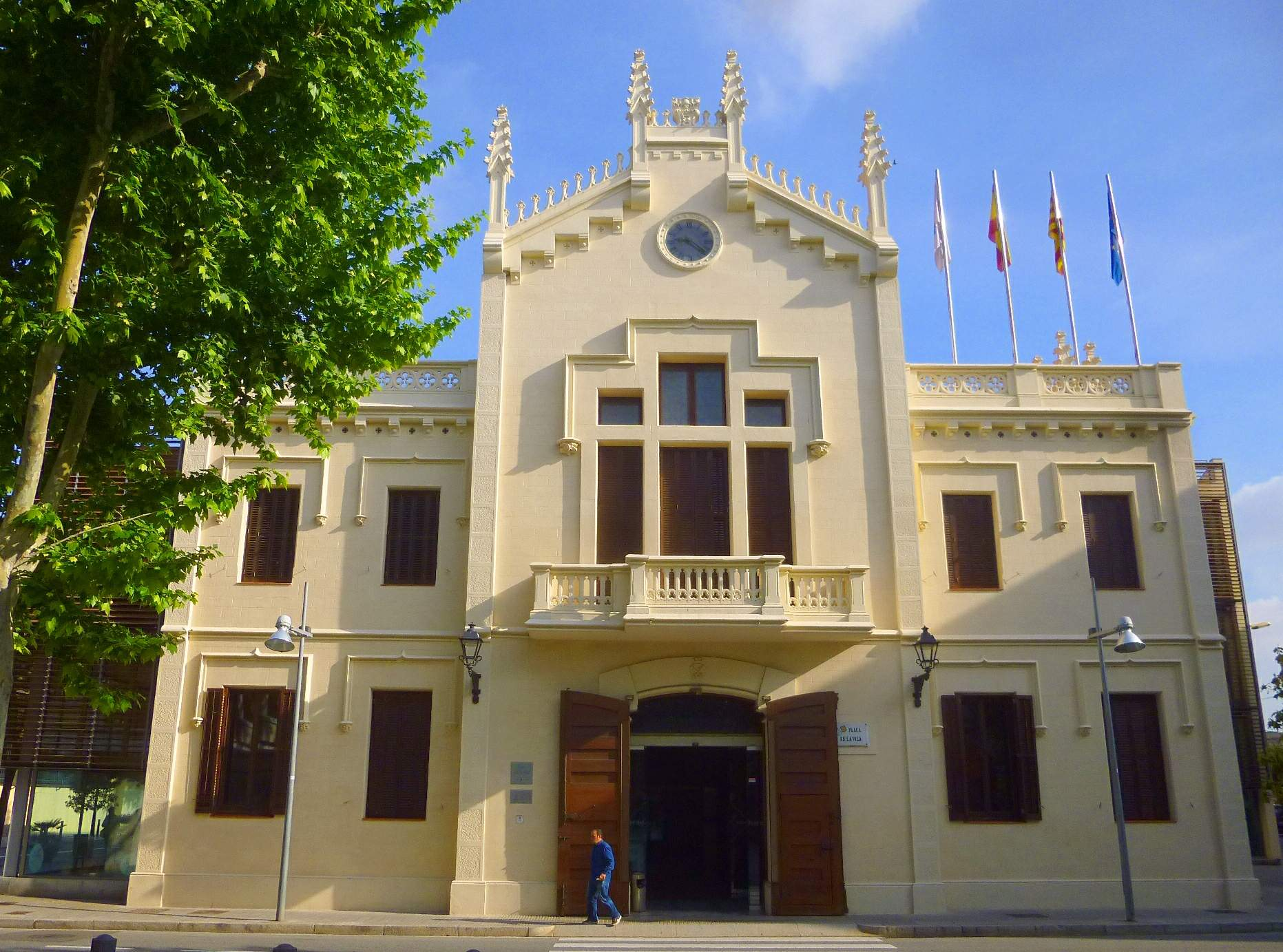 El Prat de Llobregat - Plaça de la Vila, Ayuntamiento